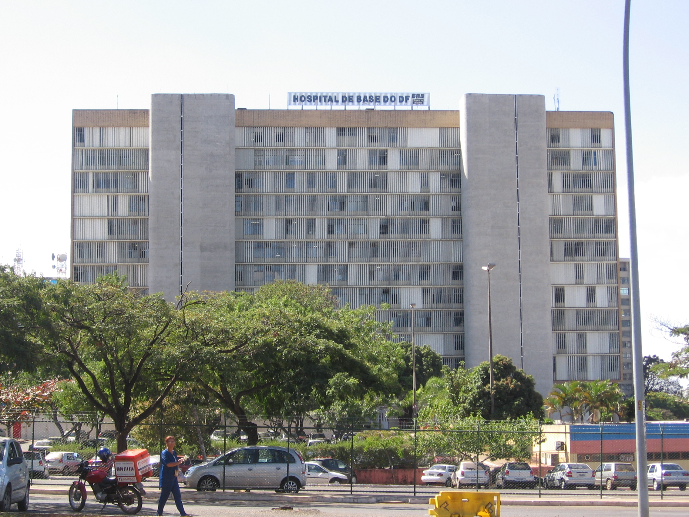 Hospital de Base do Distrito Federal, in Brasília